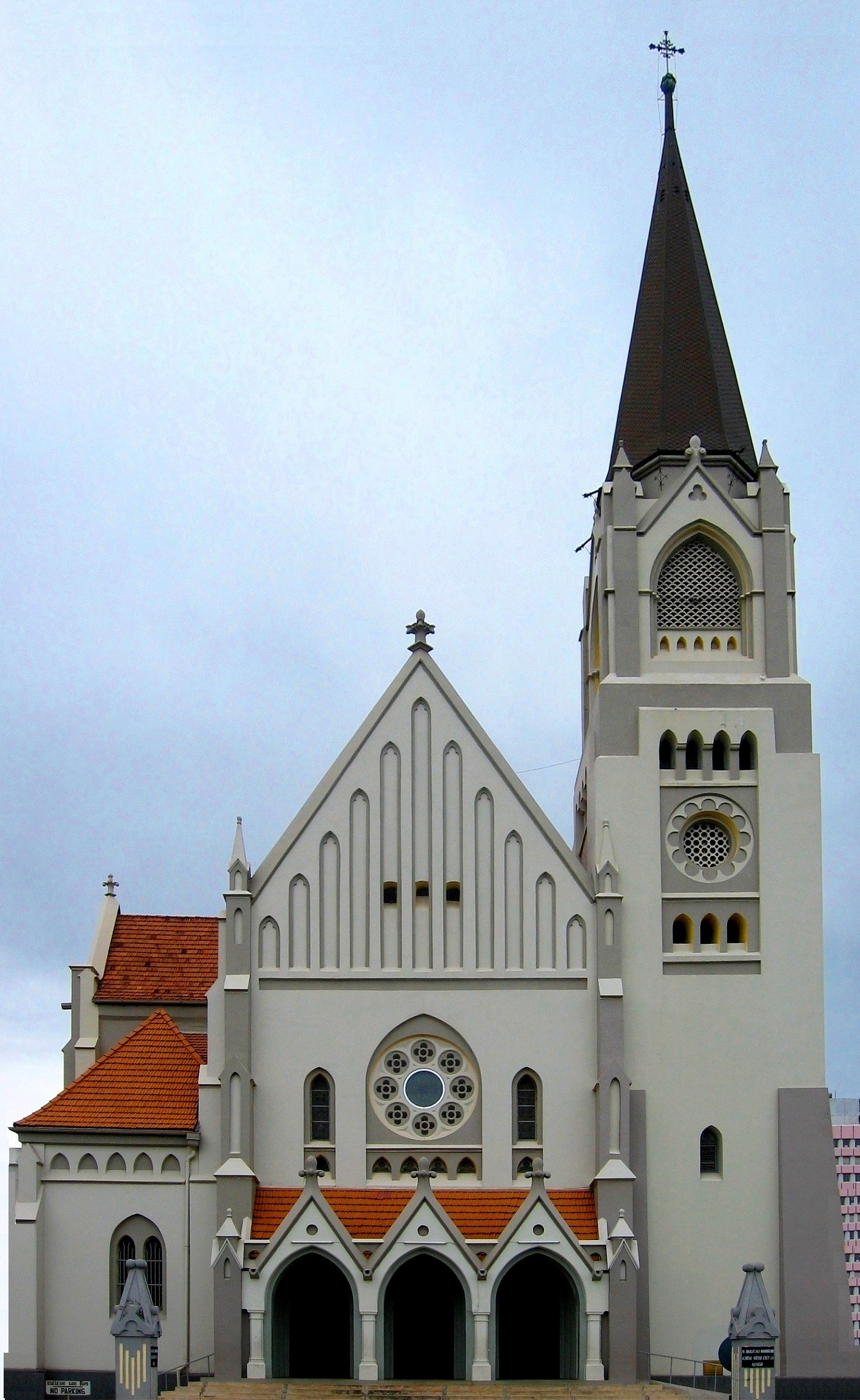 Kathedrale St. Josef, Daressalam